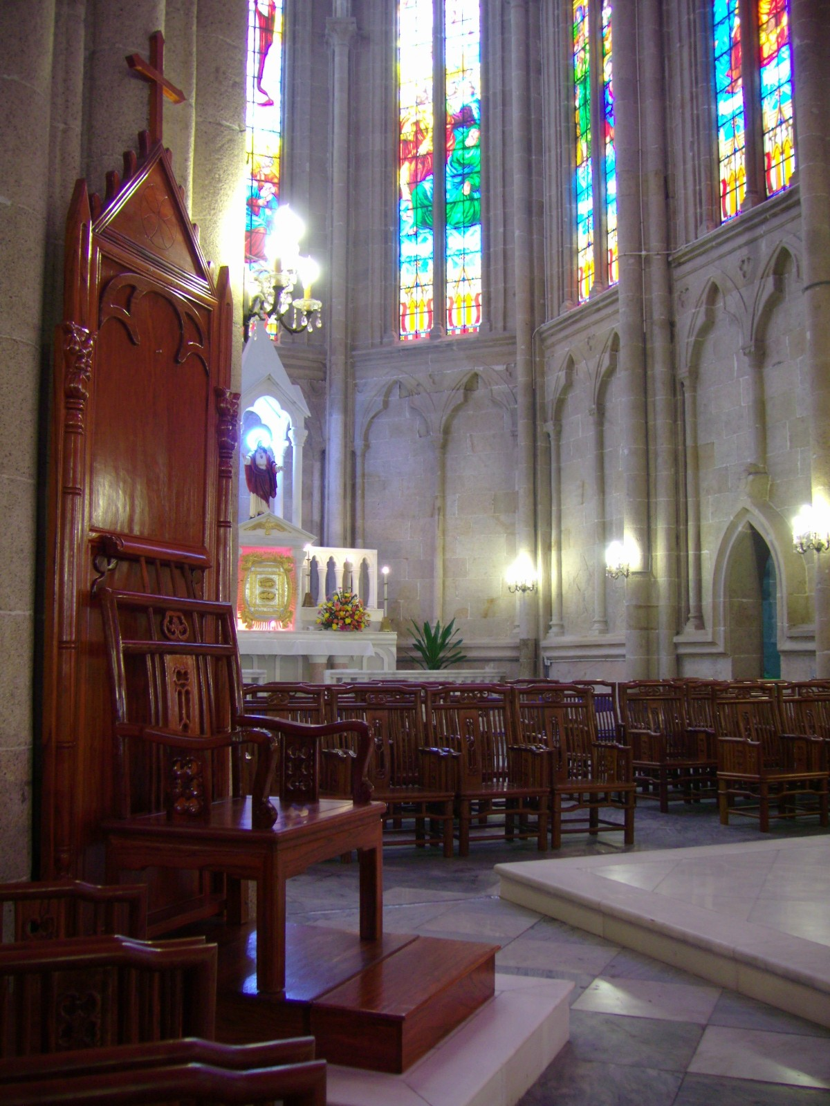 广州石室教堂内的主教席位